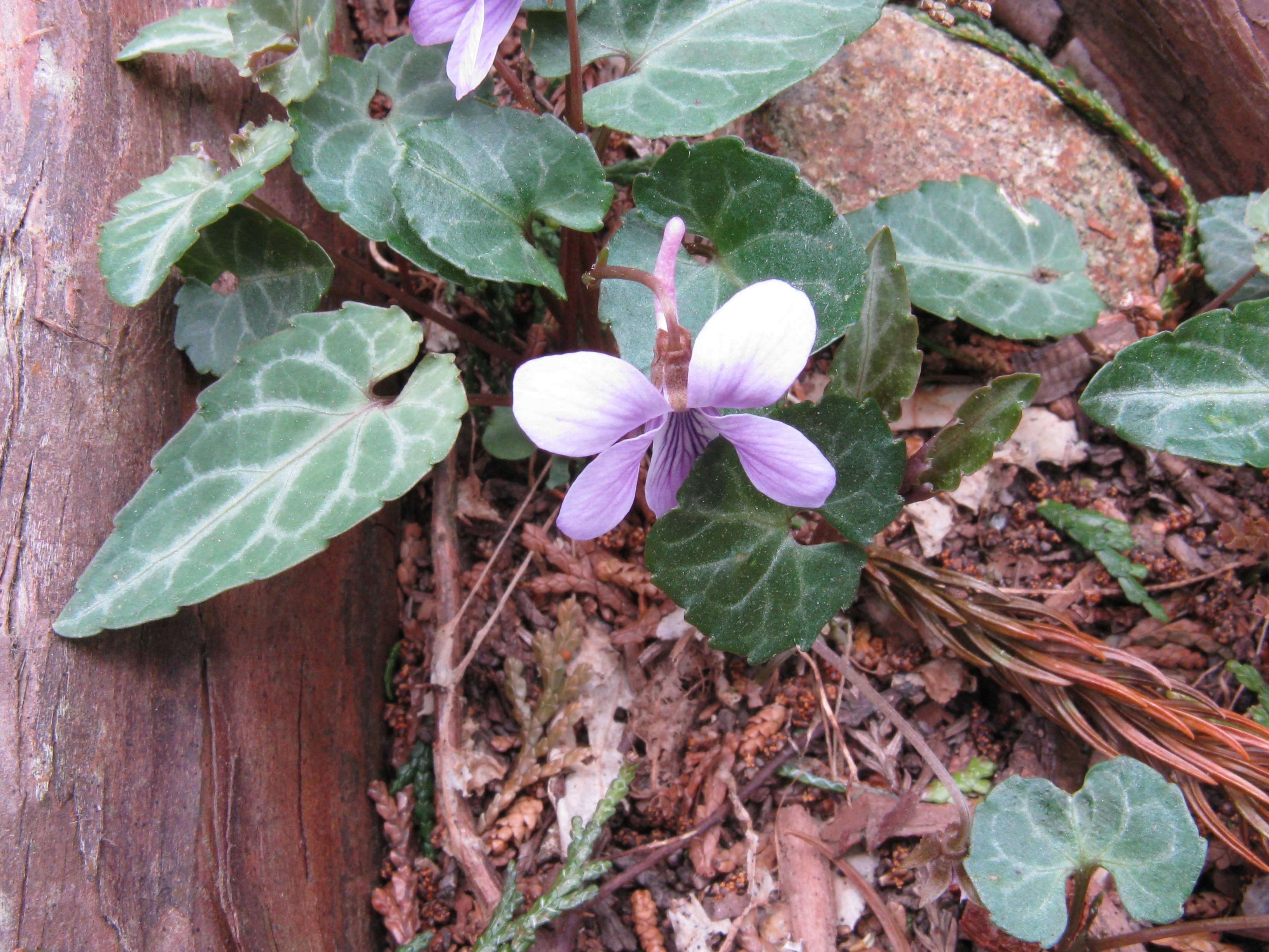 Scientific name Viola violacea